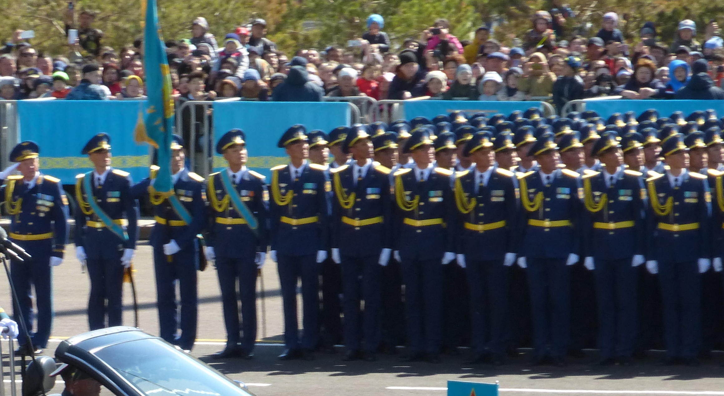 Эксклюзивный кабриолет Lincoln Town Car для военных парадов. Астана. 7 мая 2017 года